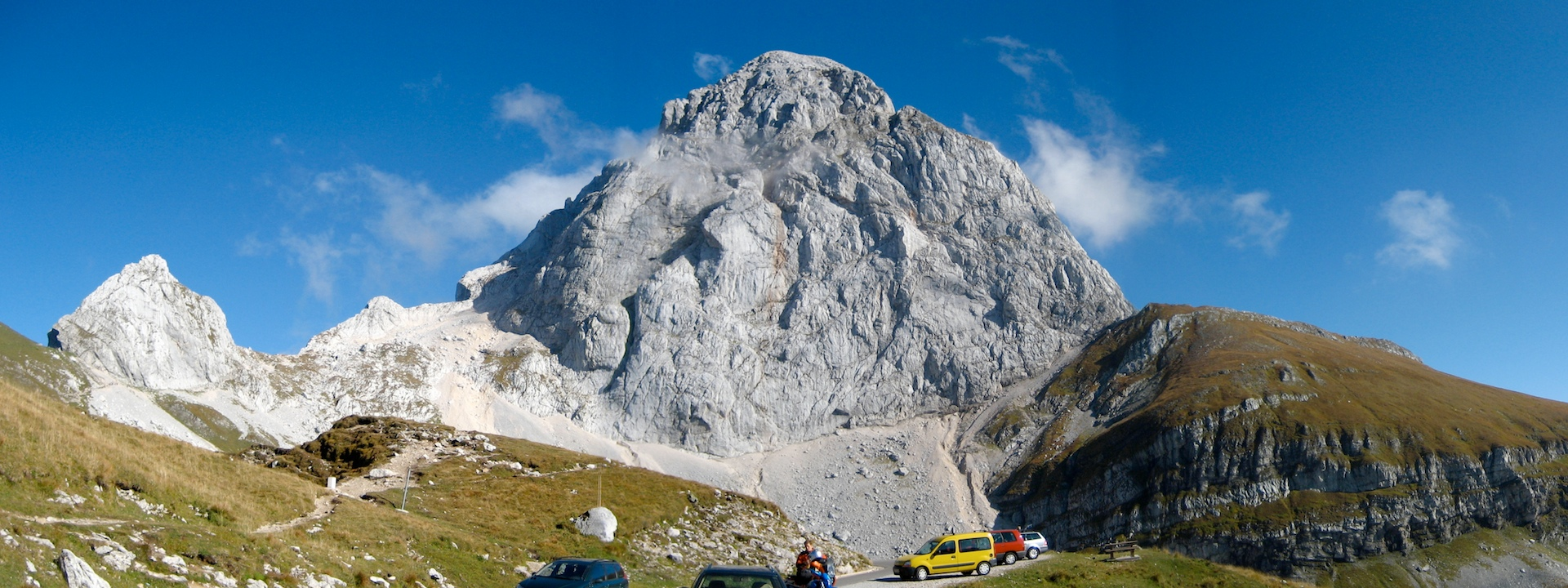 Mangart von der Westseite